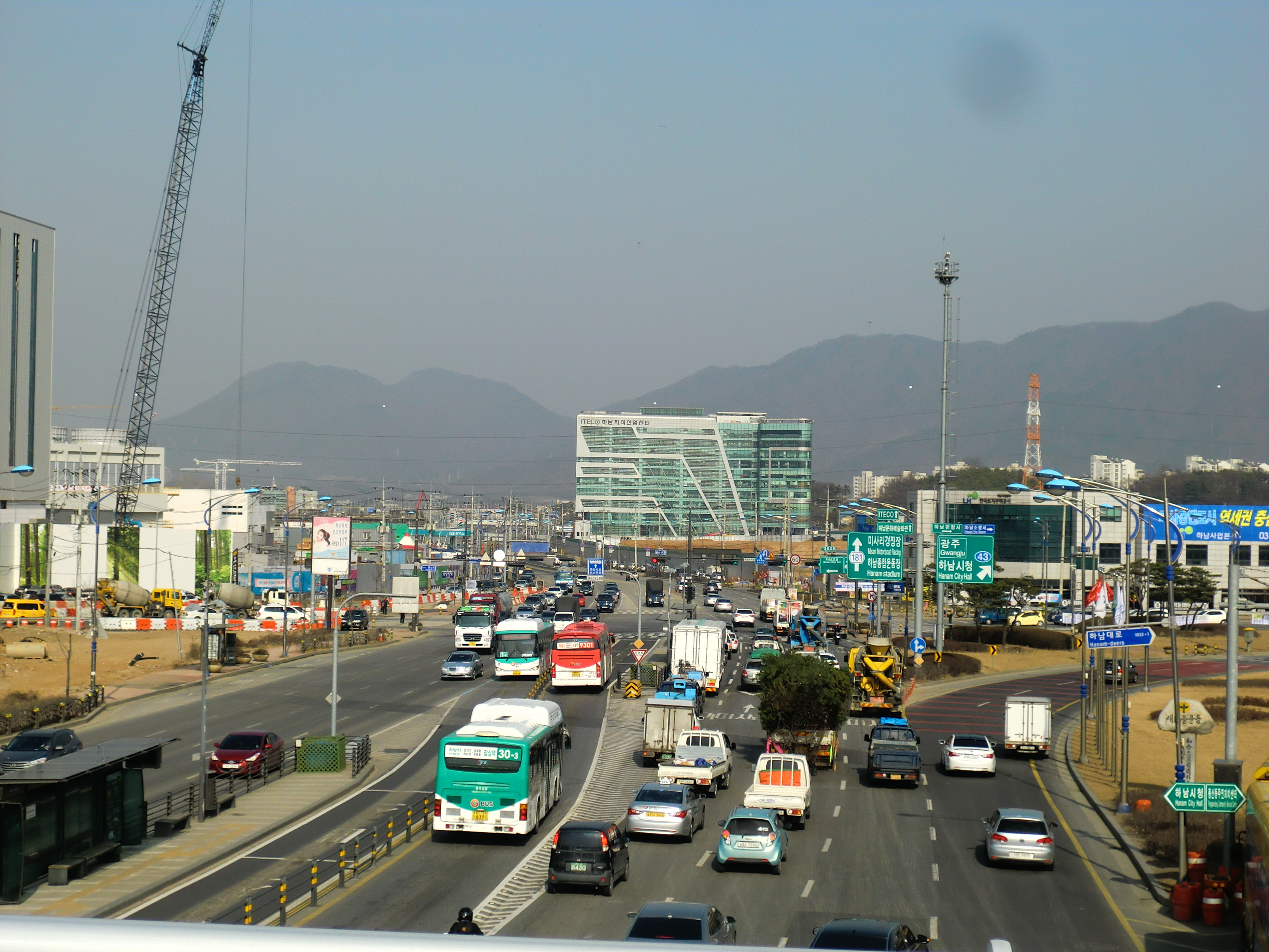 국도43호선 경기도 하남시 황산사거리